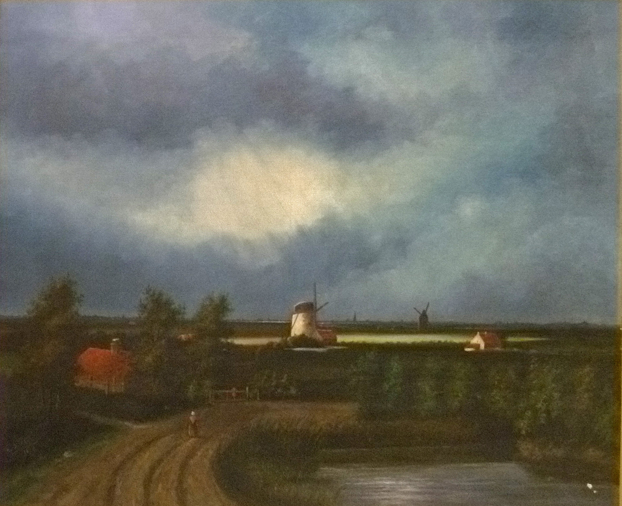 "Landschap met molens", olieverf op doek (80 x 101 cm); getekend door Emile Spilliaert; privébezit